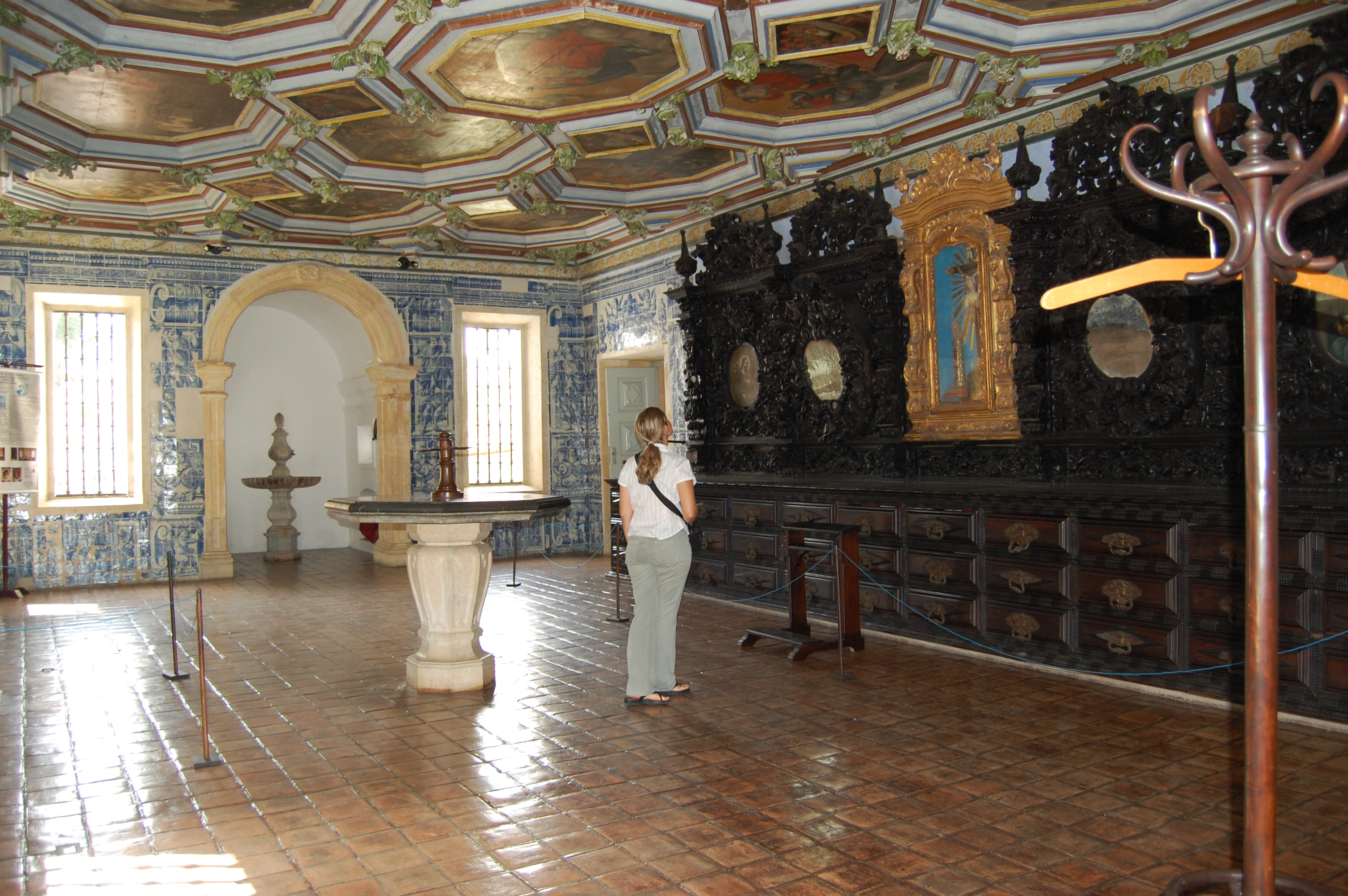 Interior da sacristia do Convento de São Francisco - Olinda, Pernambuco, Brasil